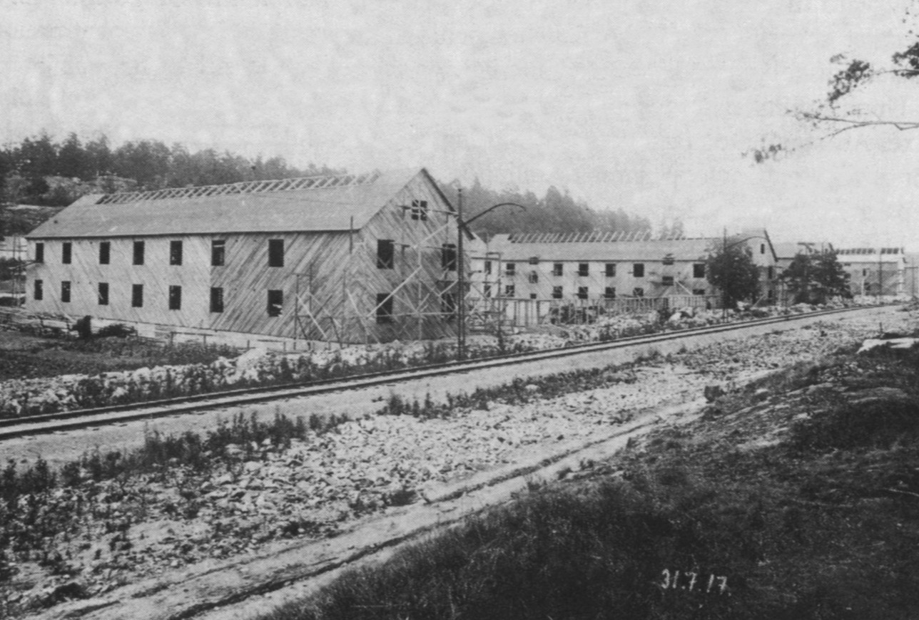 Nödbostäder i Alvik under uppförande